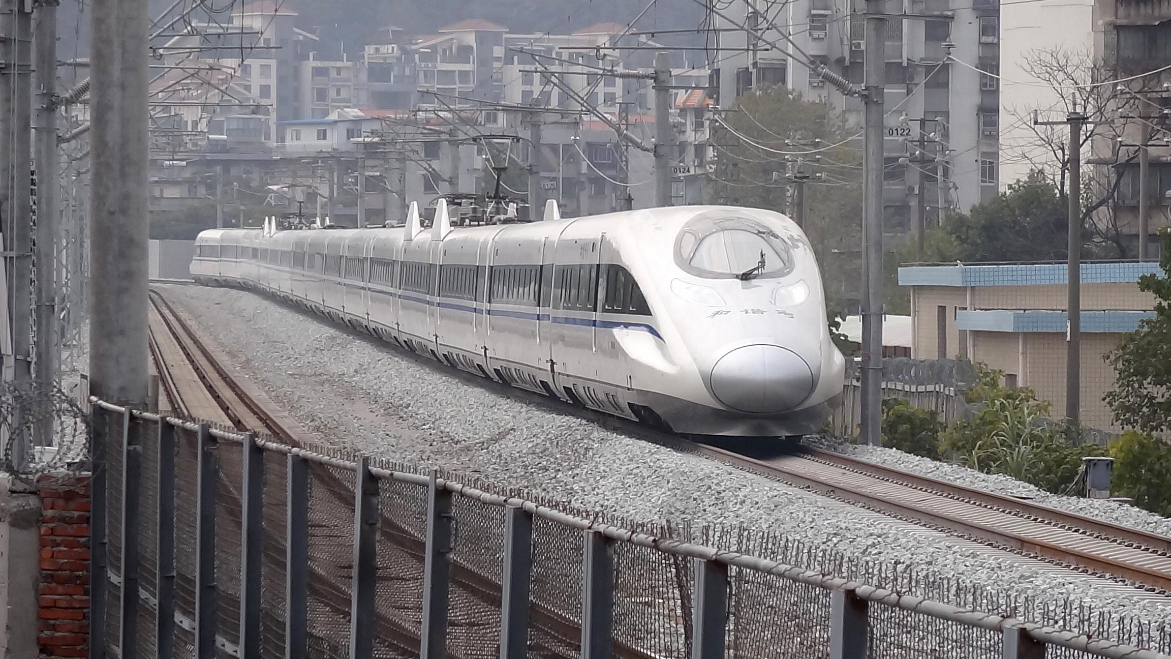 中文（中国大陆）: CRH380A-6061L通过桂林丽君立交桥.jpg